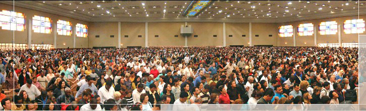 Igreja Universal do Reino de Deus, São Paulo